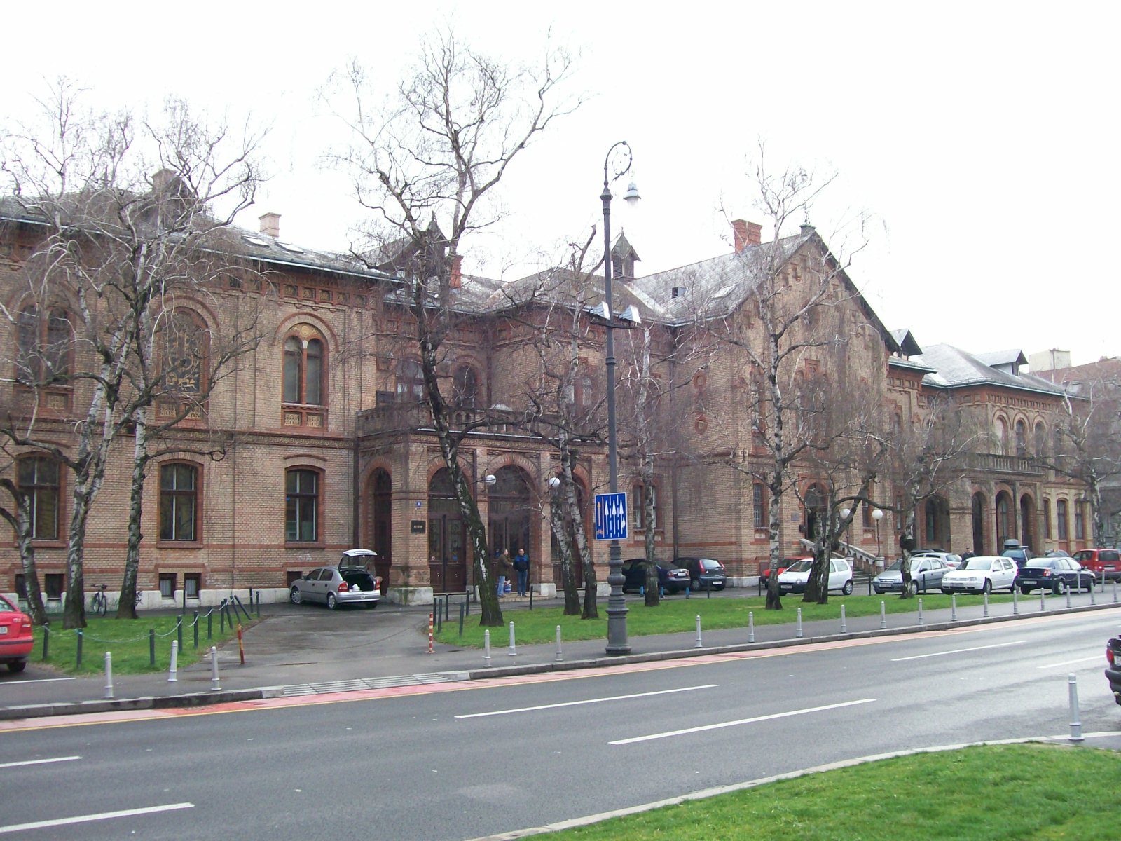 Akademija dramske umjetnosti i Hrvatski sokol